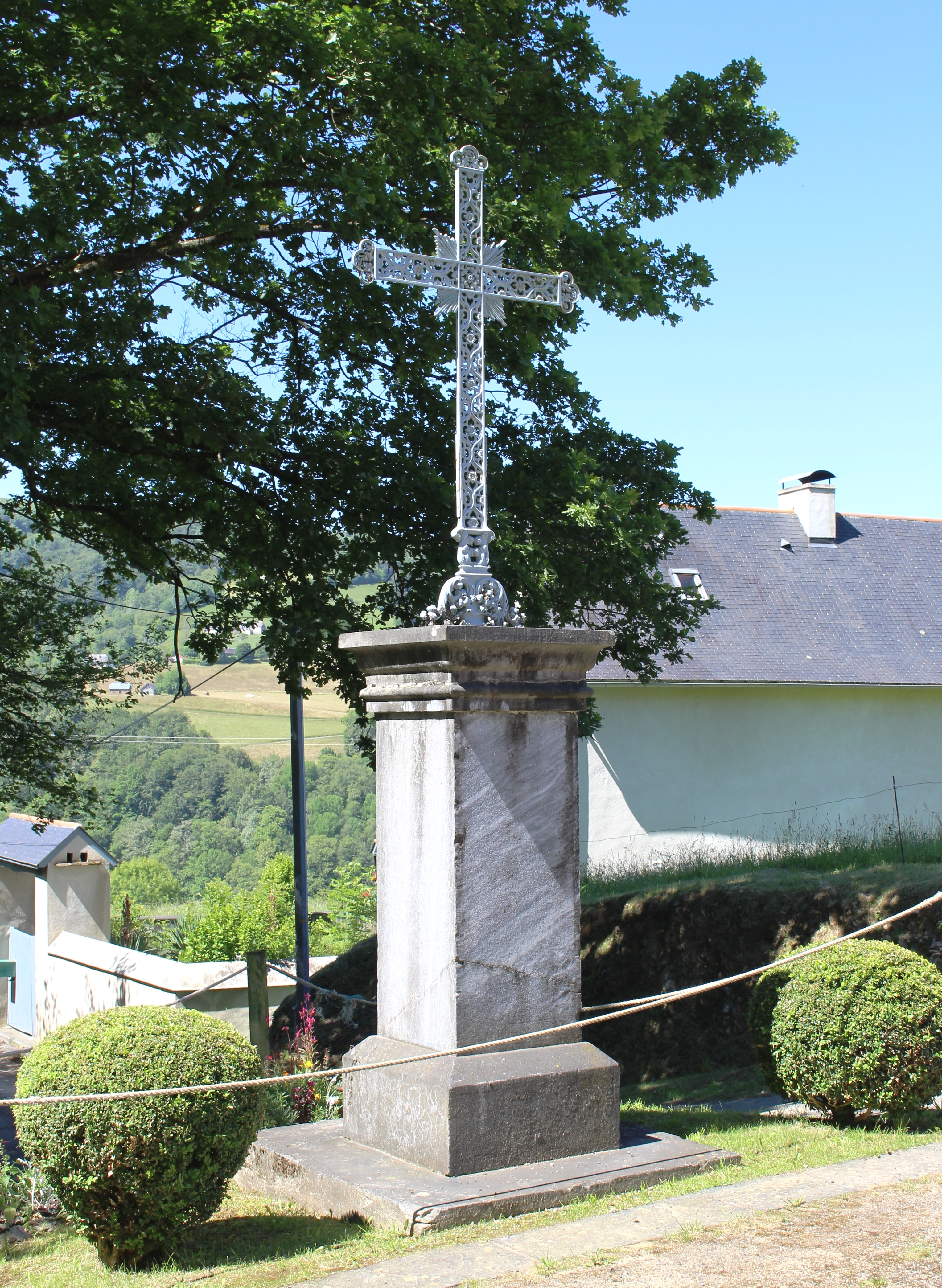 Croix de Lies (Hautes-Pyrénées)